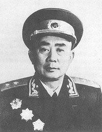 谭甫仁中将1955年授衔照